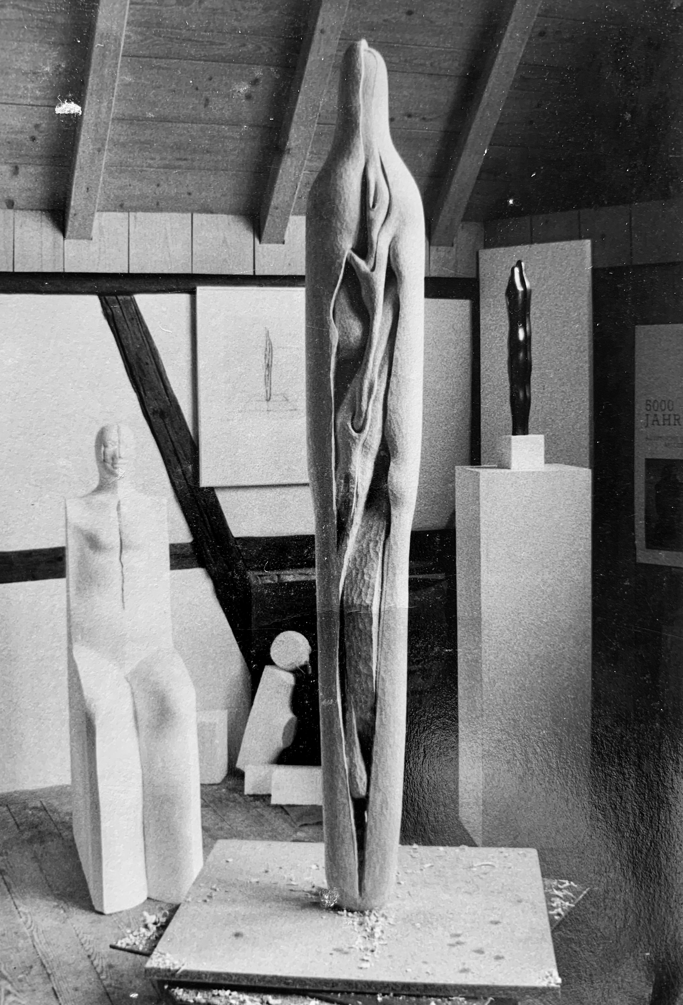 Andromache - Lindenholz, 200cm, 1987